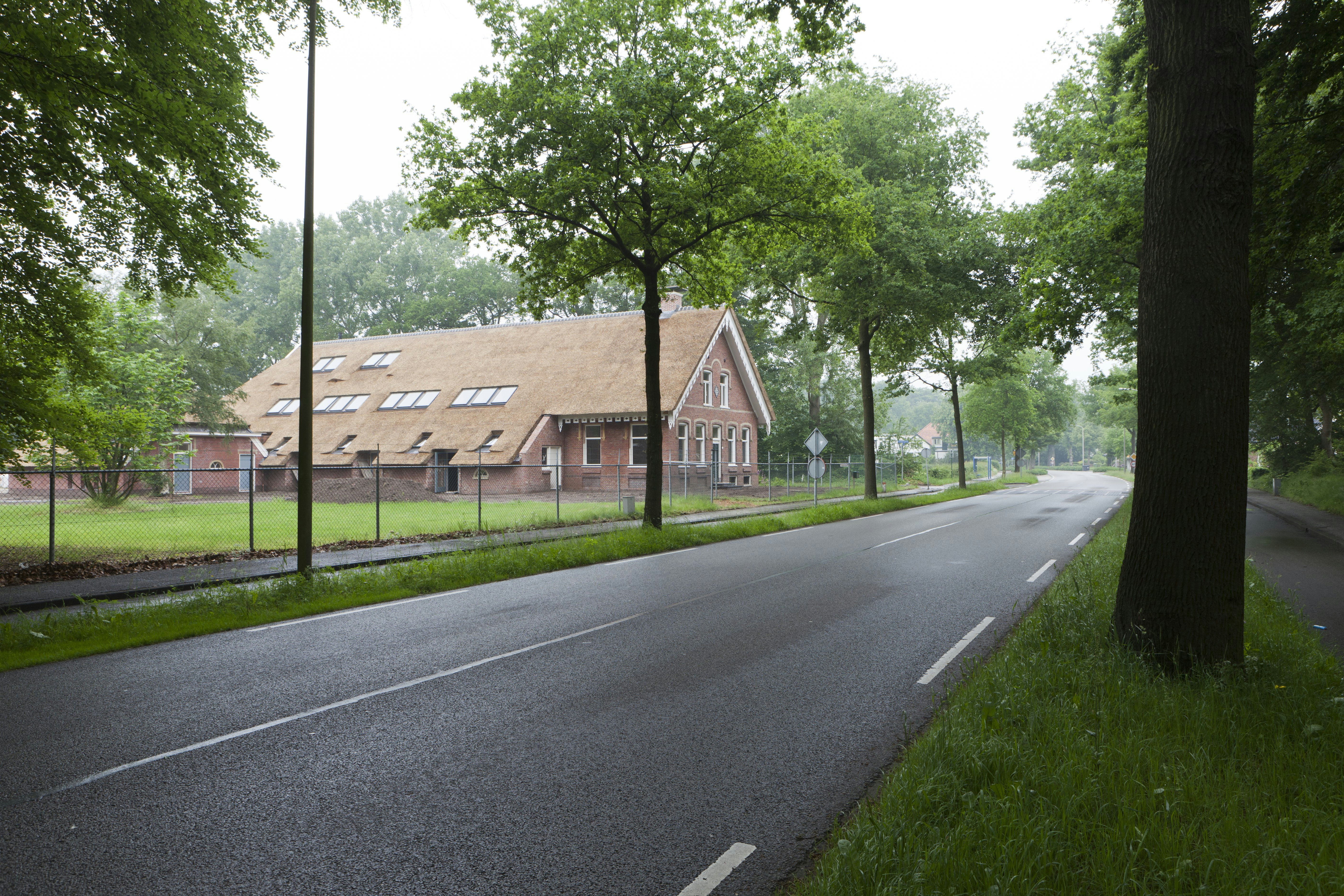 Weltevreden: Ligging van boerderij in zijn omgeving